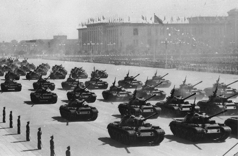 1959年中華人民共和國國慶閱兵時登場的59式坦克。這是59式坦克的初次公开露面。